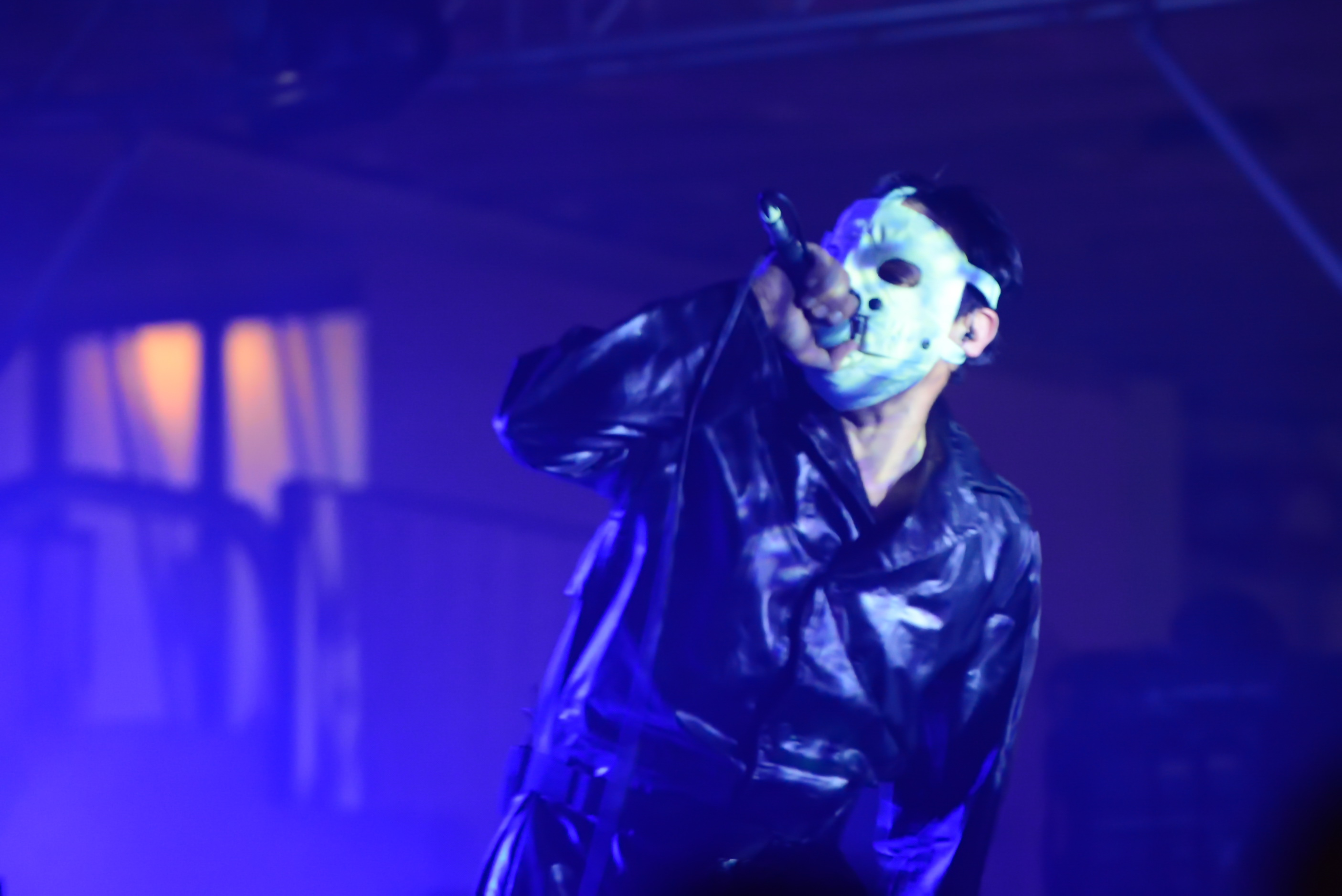 Klinik, Amphi festival 2014